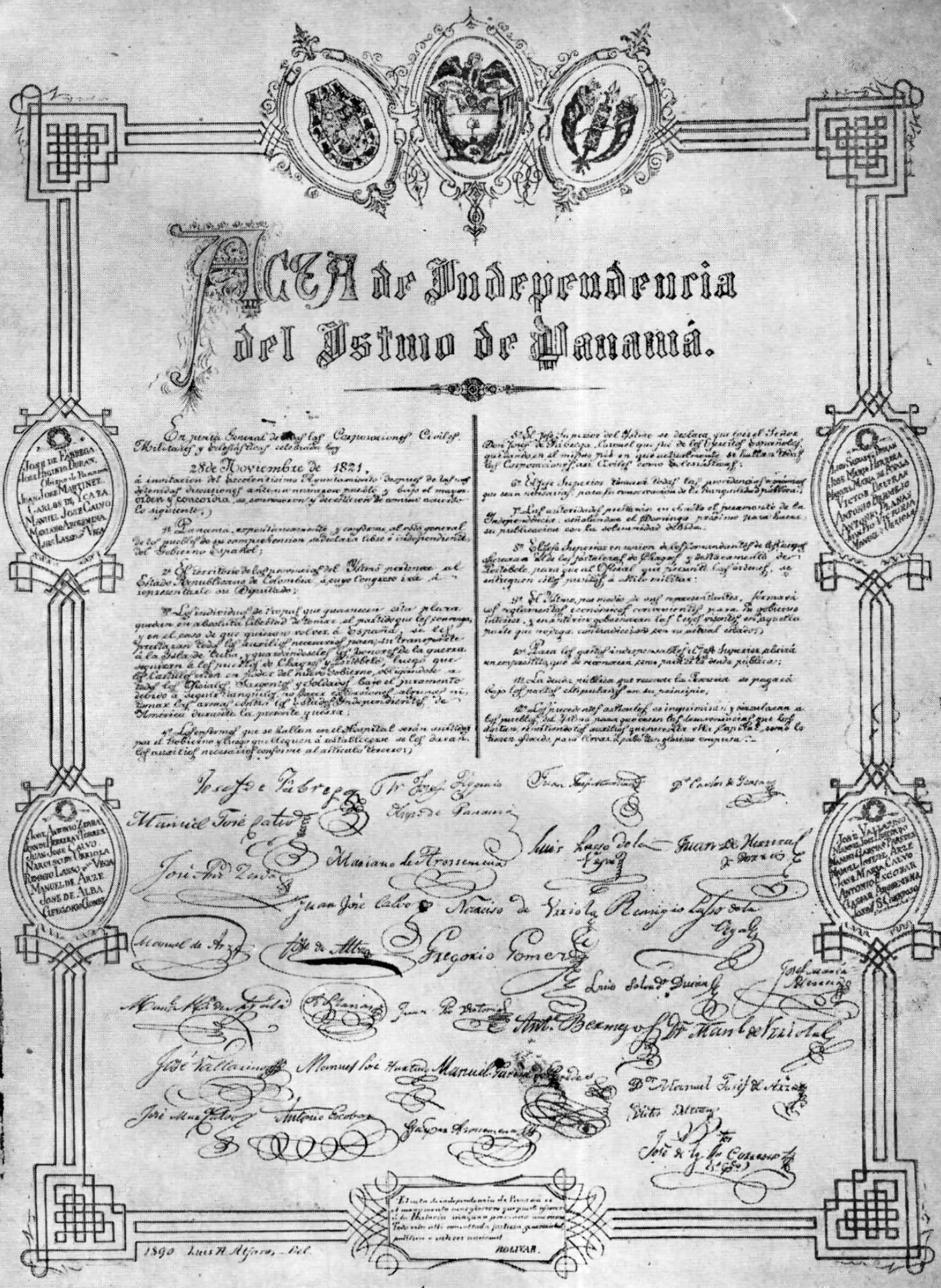 Actas de Independencia de Panamá de España